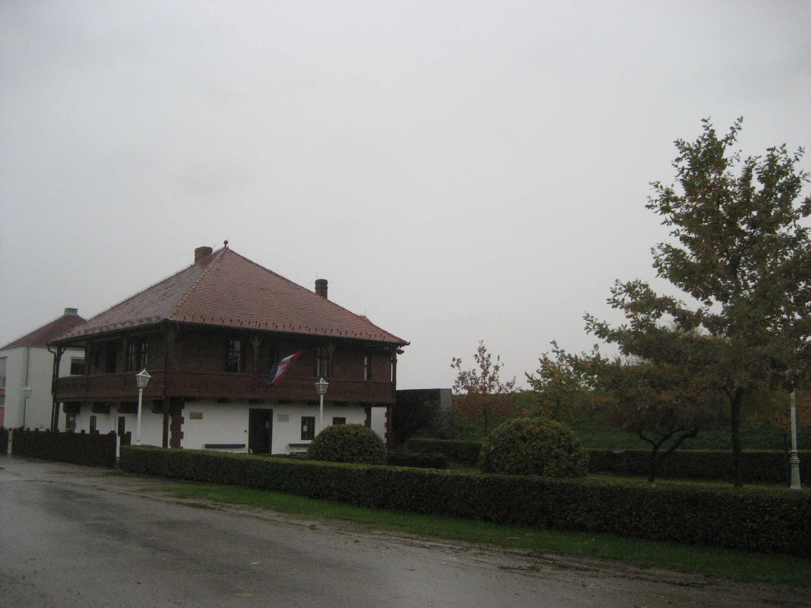 Cardak Museum in Zupanja